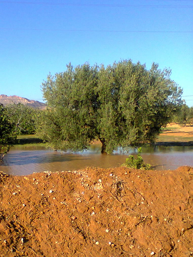 A Sidi Bouzi, Tunisie